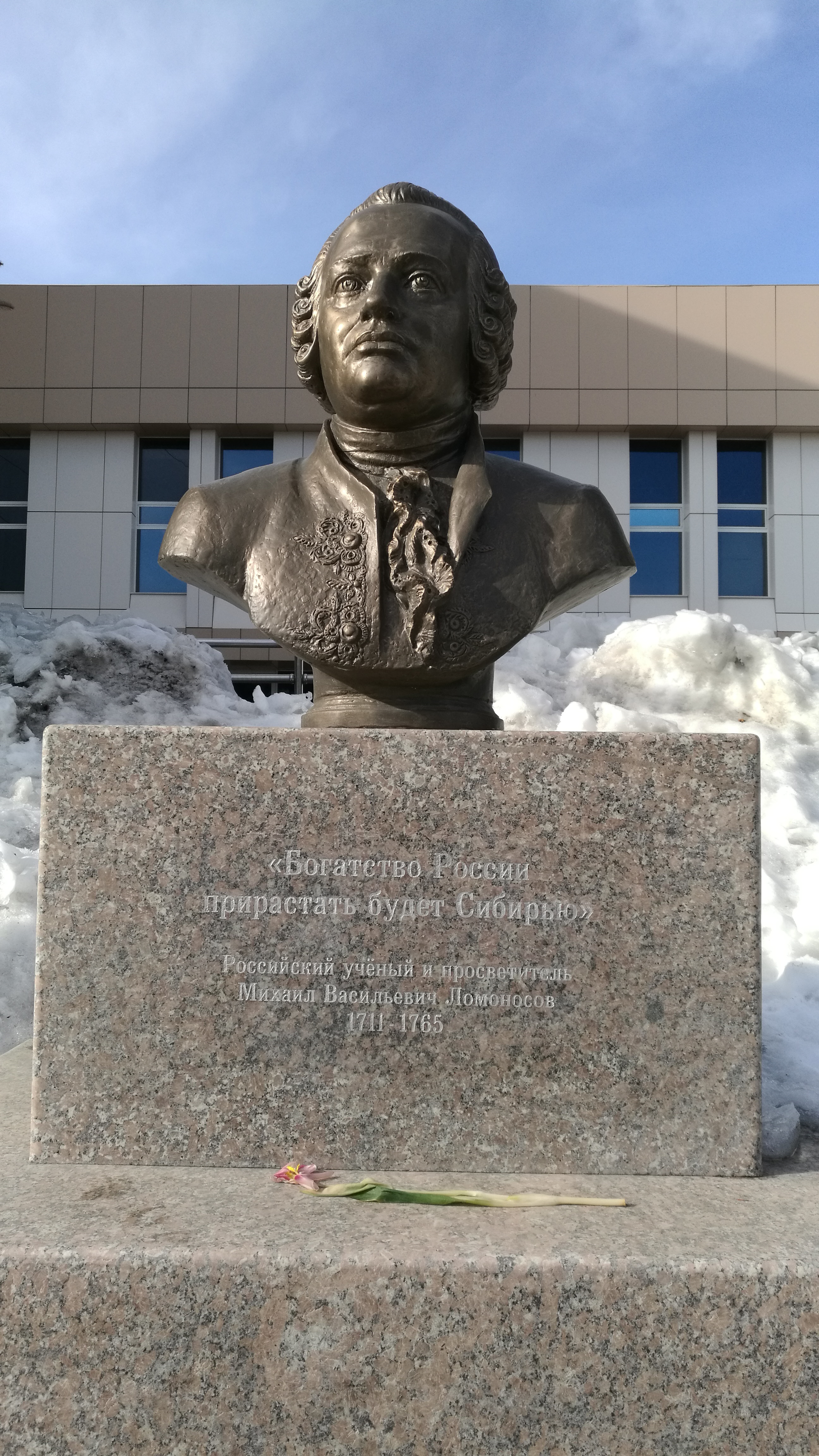 Busto de Miĥail Lomonosov en Tjumeno apud la teĥnoparko. Tjumeno, Rusio.